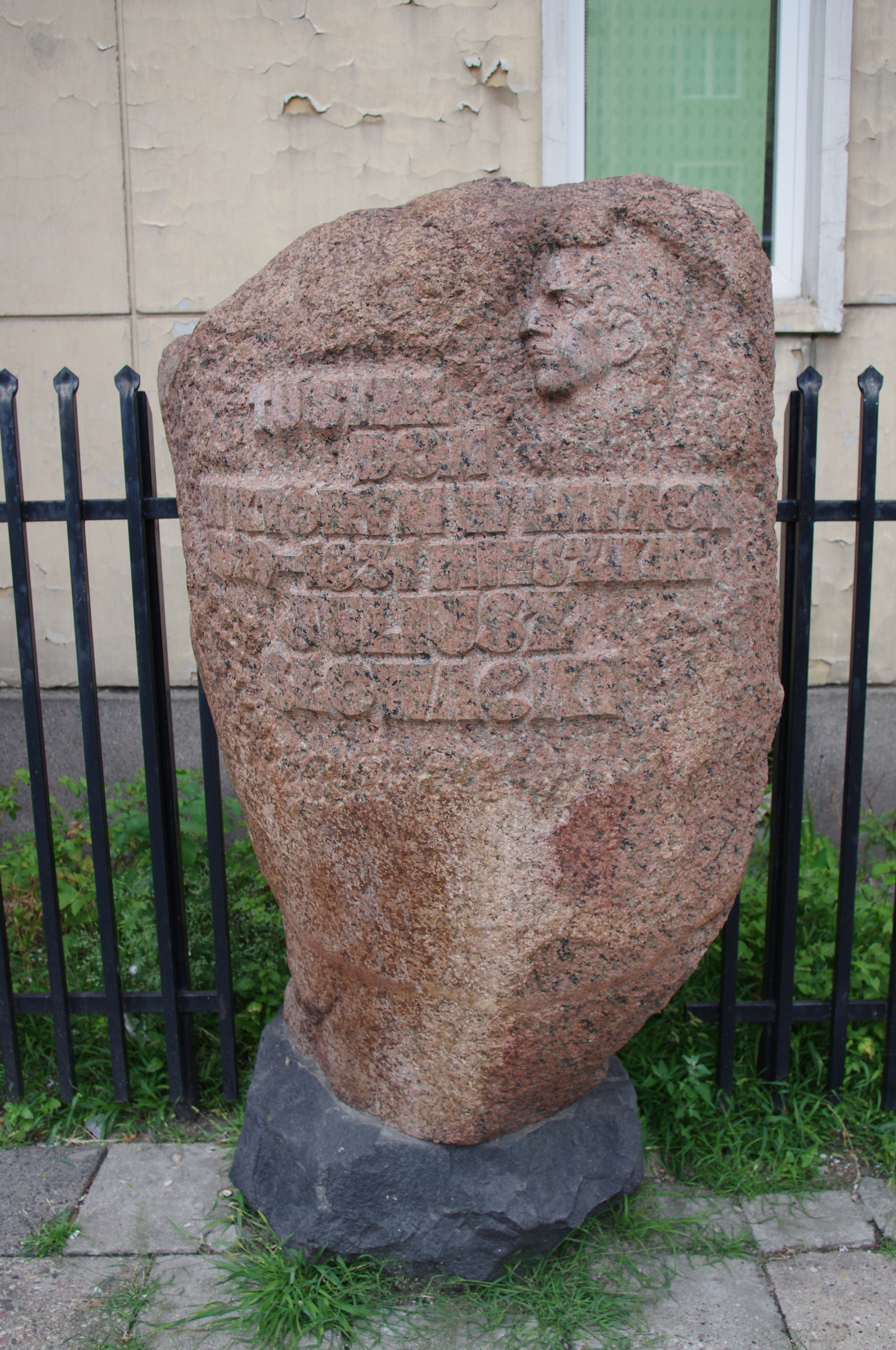 Kamień upamiętniający Juliusza Słowackiego na ul. Elektoralnej w Warszawie, w miejscu gdzie stała kamienica w której w latach 1829-1831 mieszkał poeta